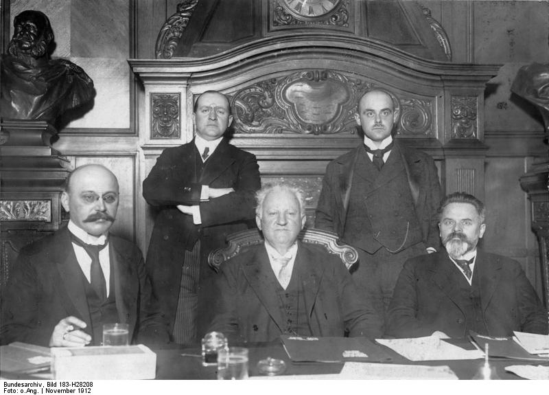 Ben/Rich Prof. Dr. Jakob Riesser, Bankmann und Handelsrechtler, geb.: 17.11.1853 in Frankfurt a. Main: gest.: 06.05.1932 in Berlin, Honorarprofessor an der Universität Berlin, Begründer und Präsident des Hansa-Bundes. UBz: Das Präsidium des Hansa-Bundes bei einer Tagung im November 1912 in Berlin. Von links: Witthöfft, von Richthofen, Riesser, Dr. Kleefeld, Hirth. Information added by Wikimedia users. Von links: Franz Heinrich Witthoefft, Hartmann von Richthofen, Jakob Riesser, Kurt von Kleefeld, Albert Hirth (letztere angenommen).